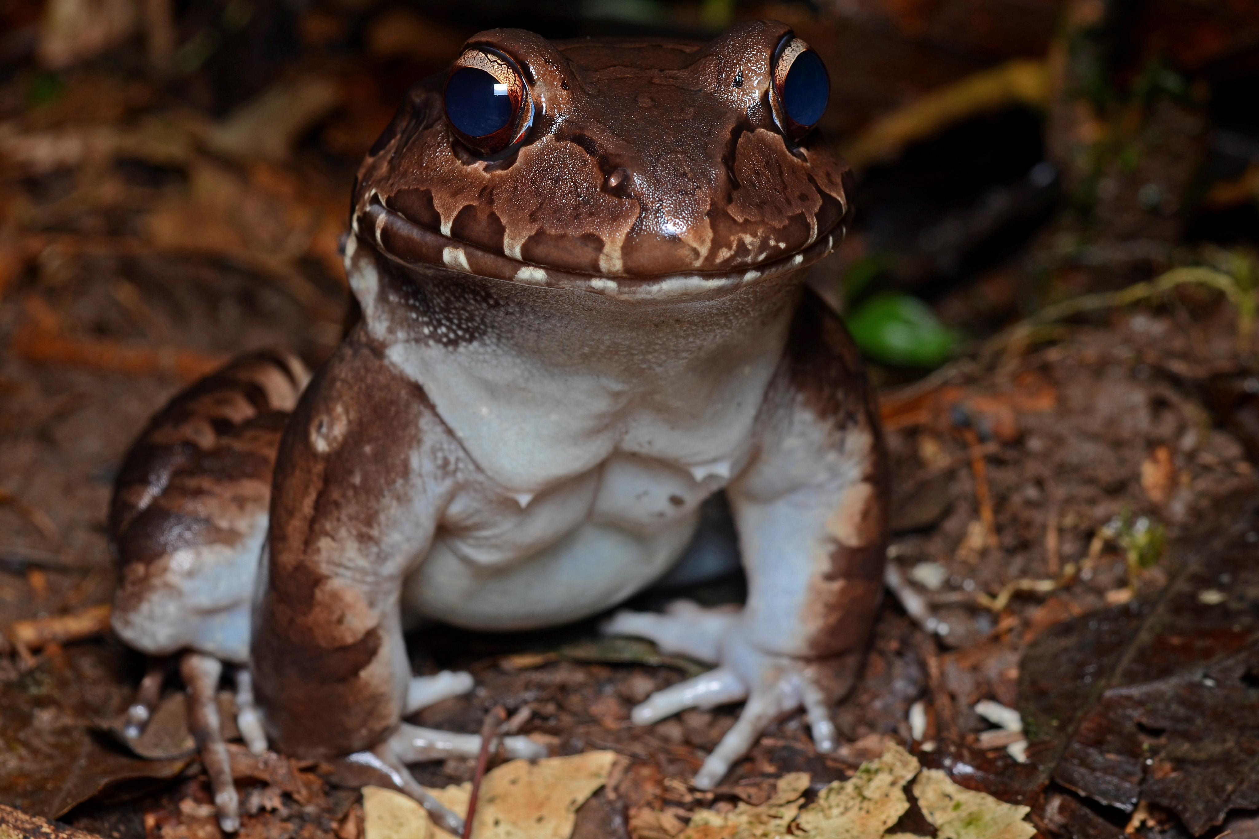 Leptodactylidae: Leptodactylus pentadactylus